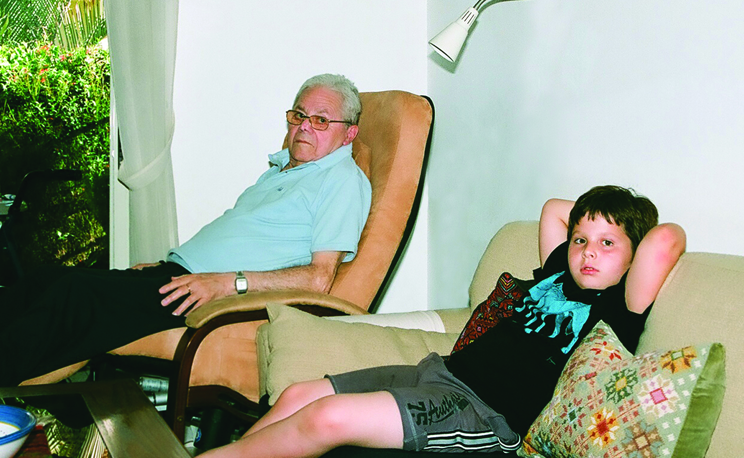 פריים מתוך הסרט הוגו 2 (2008) במאי: יאיר לב